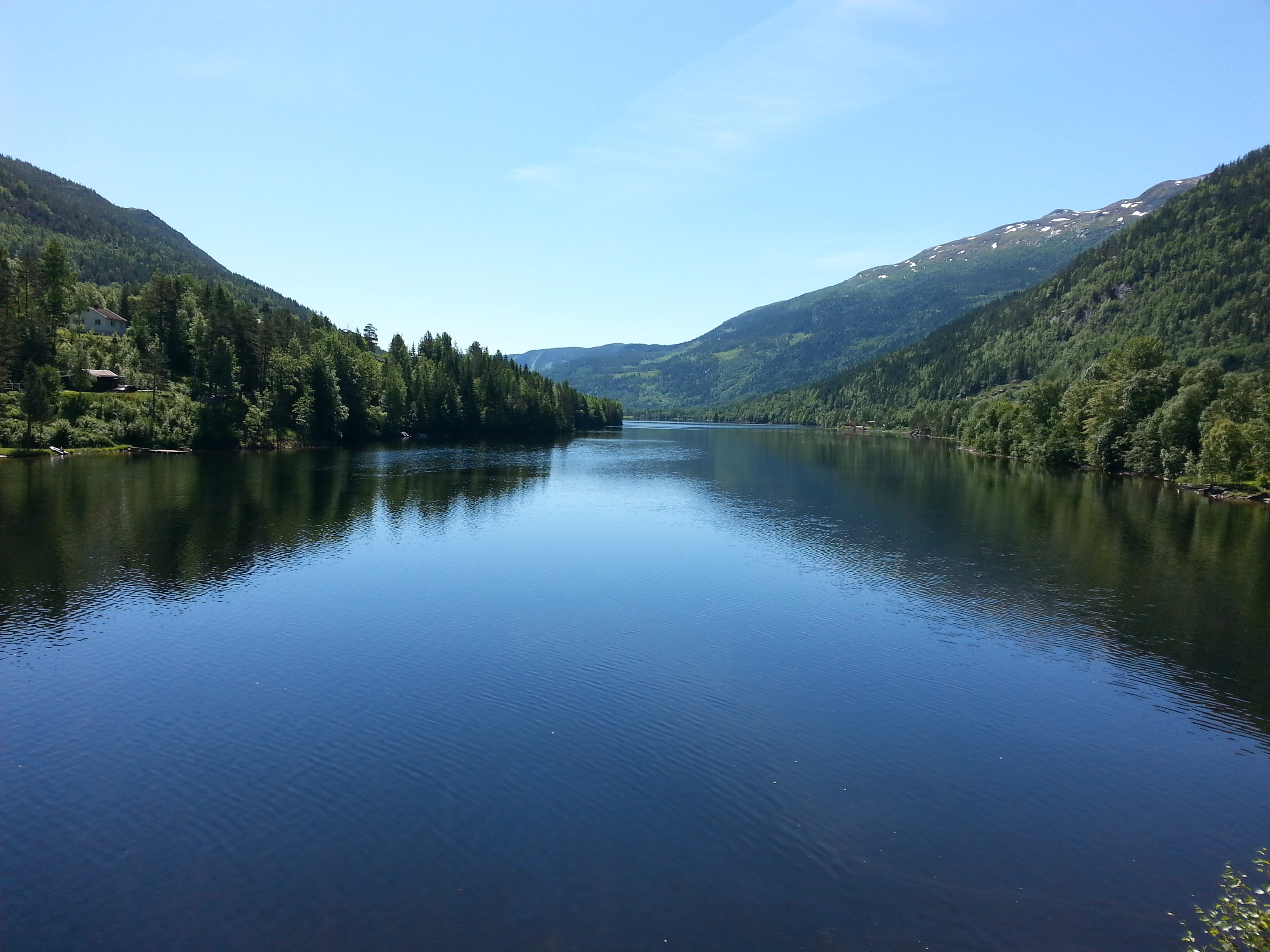 Norefjorden, en innsjø som ligger i Nore og Uvdal kommune i Buskerud. Bilde tatt sørover fra Norefjord bro.